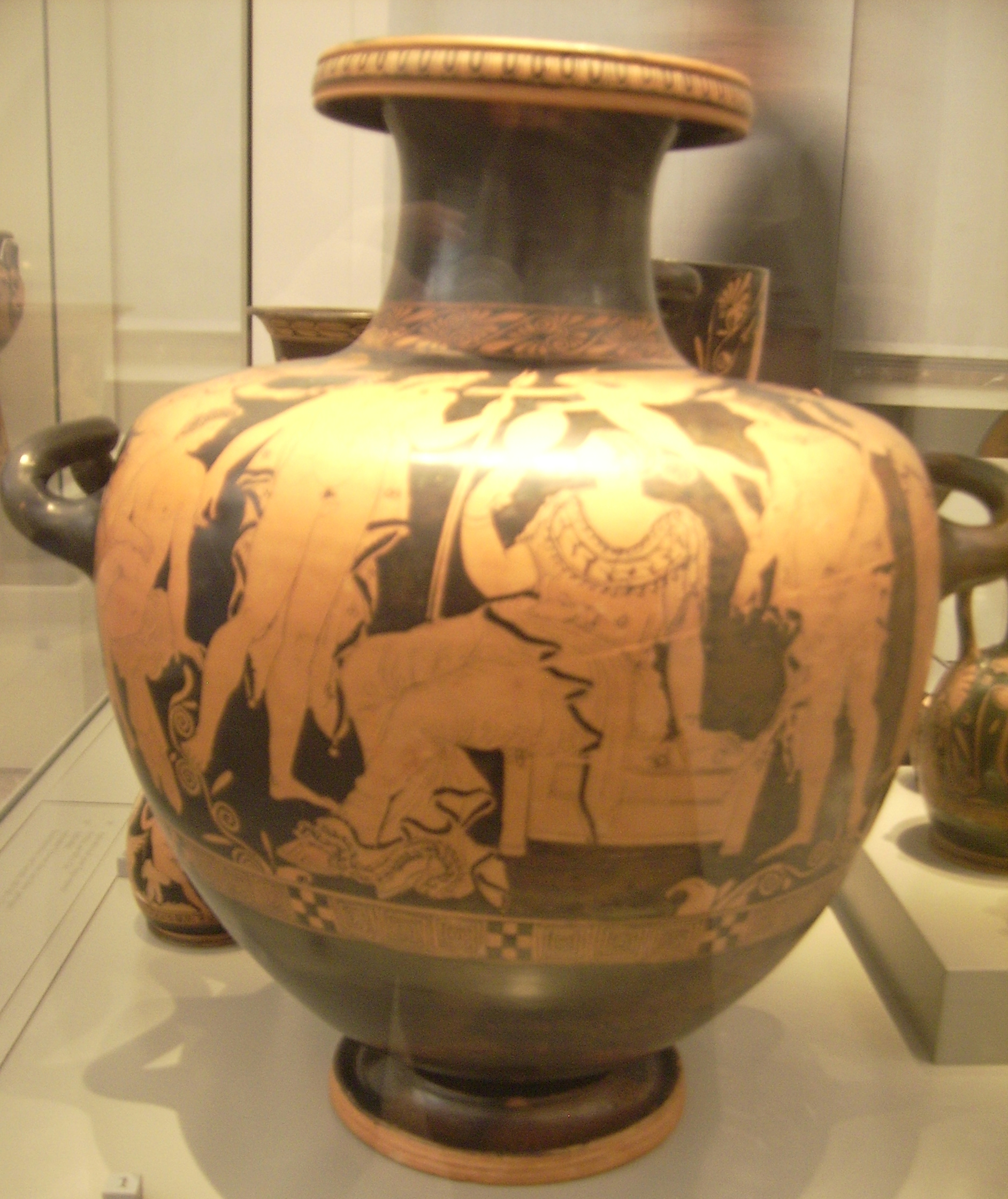 Paris und Helena als glückliches Paar; Hydria des Jena-Malers, um 390 v. Chr., gefunden auf Rhodos, Antikensammlung Berlin/Altes Museum